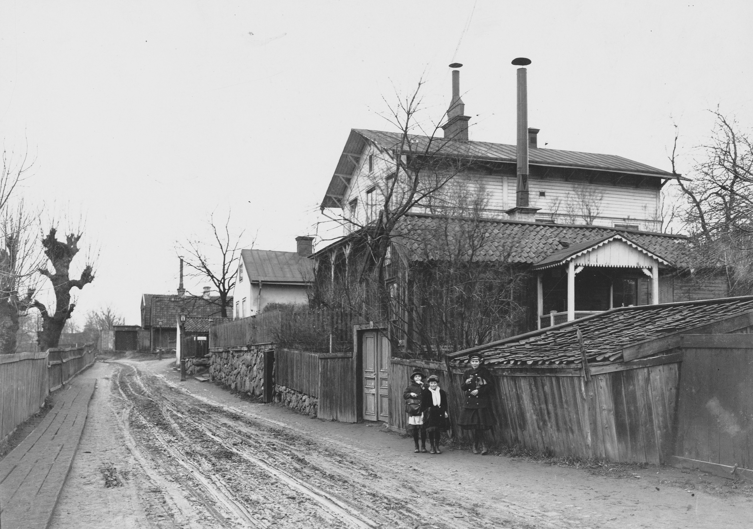 Stora Mejtens gränd 8 (Missionshuset)